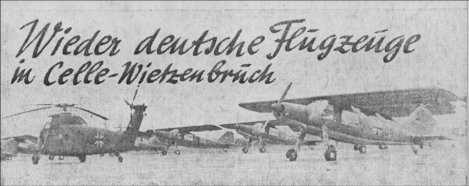 Titelbild der Celleschen Zeitung zur Übergabe des Heeresflugplatzes Celle an die deutschen Streitkräfte